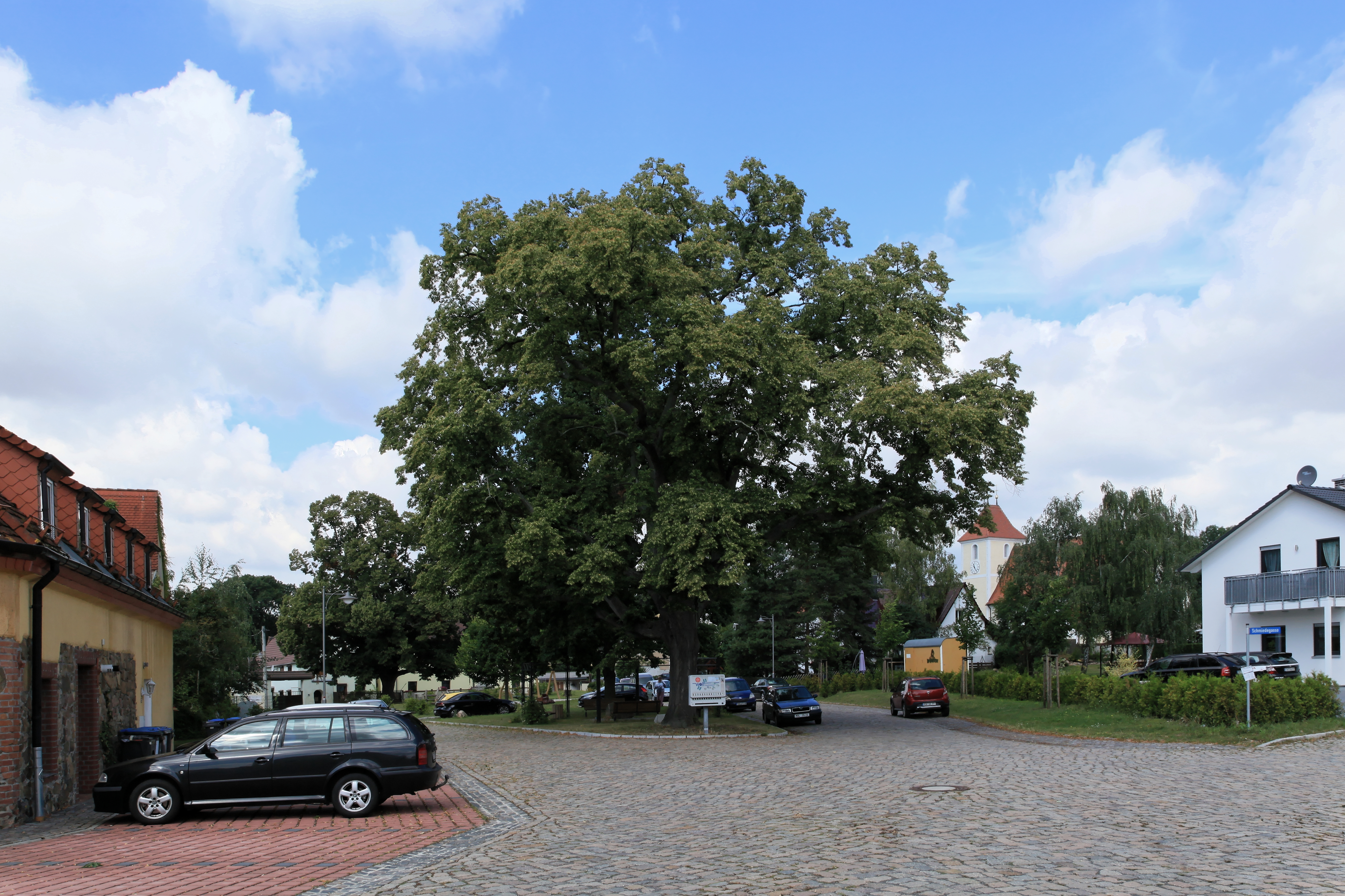 Bismarck-Linde auf dem Lindenplatz in Weltewitz, Jesewitz